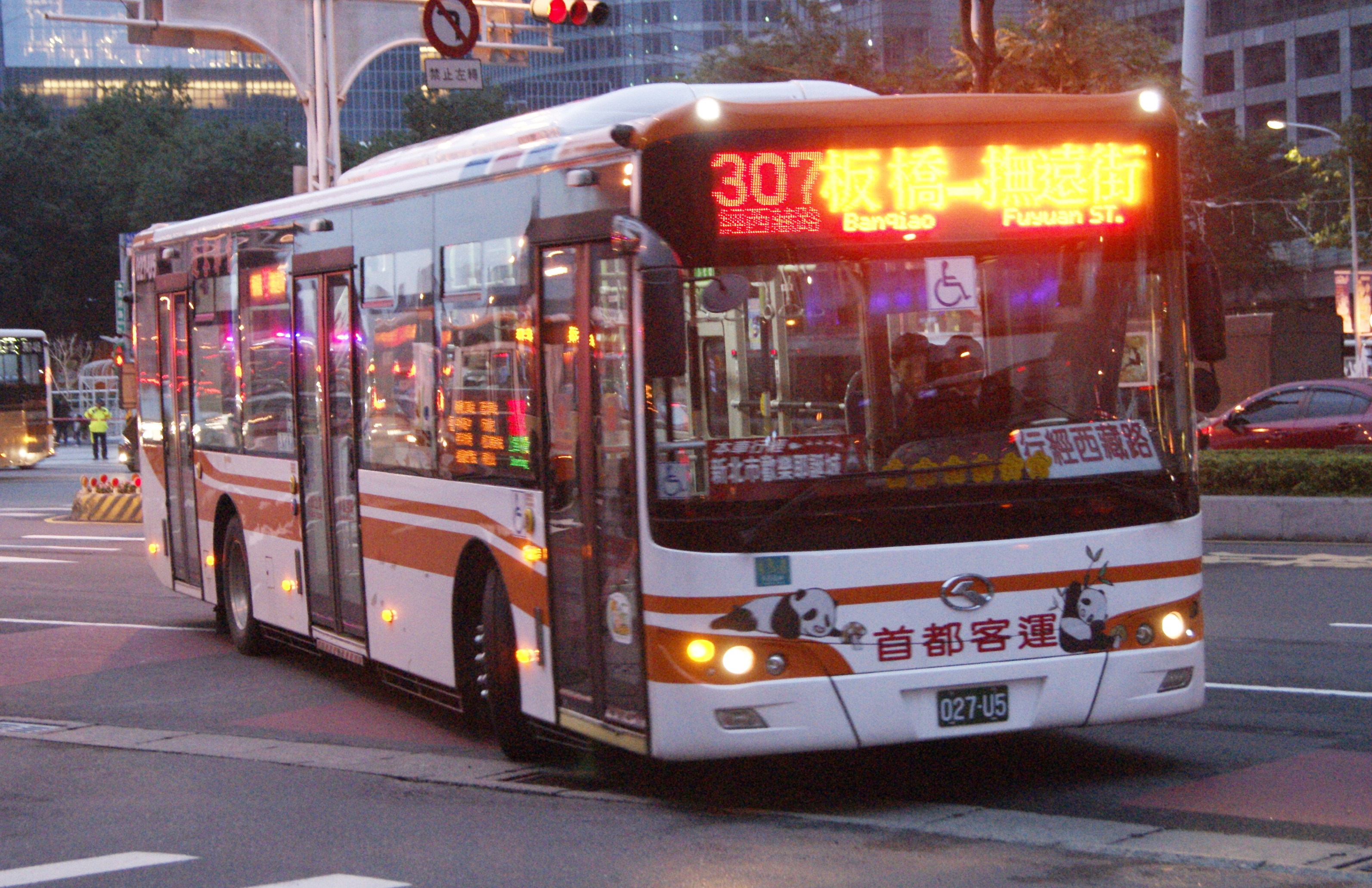 中文（台灣）: 首都客運2013年金龍XMQ6120AGD5大客車027-U5行駛307線